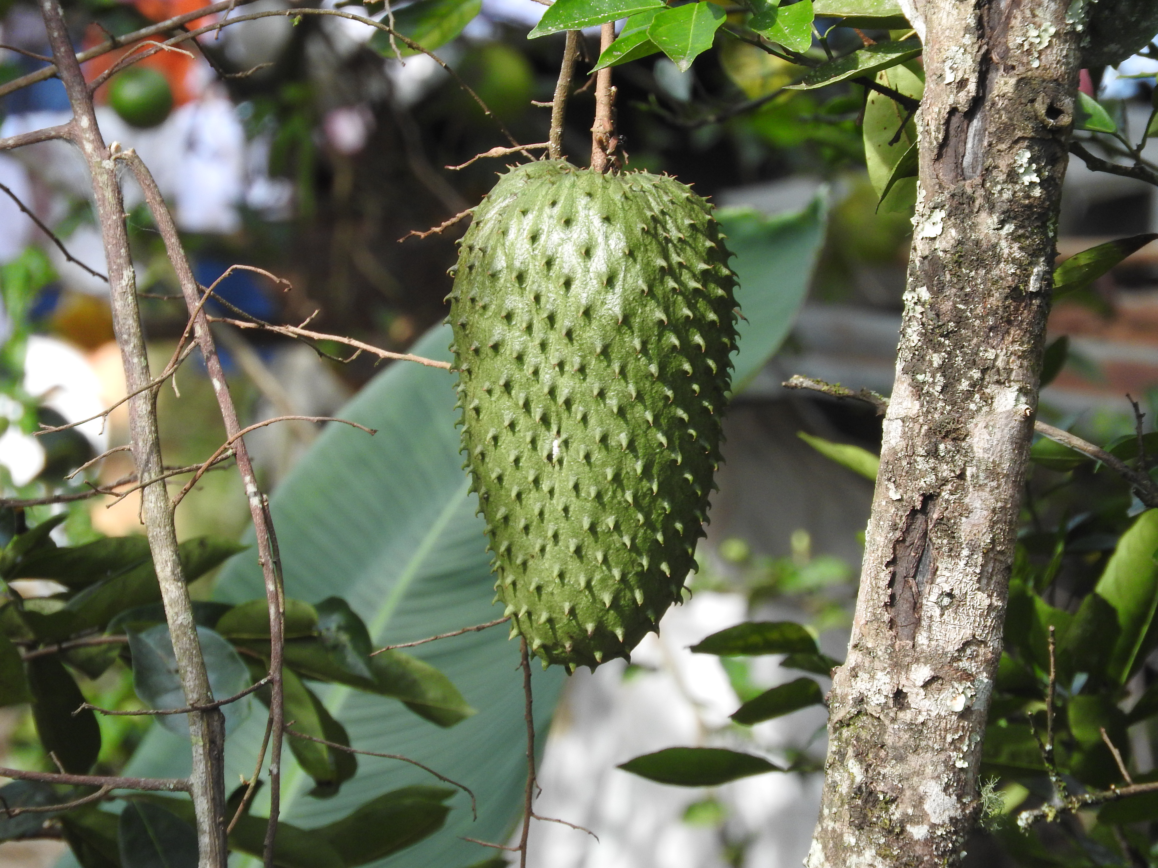 Esta fotografía fue tomada en el municipio colombiano con código 05890.